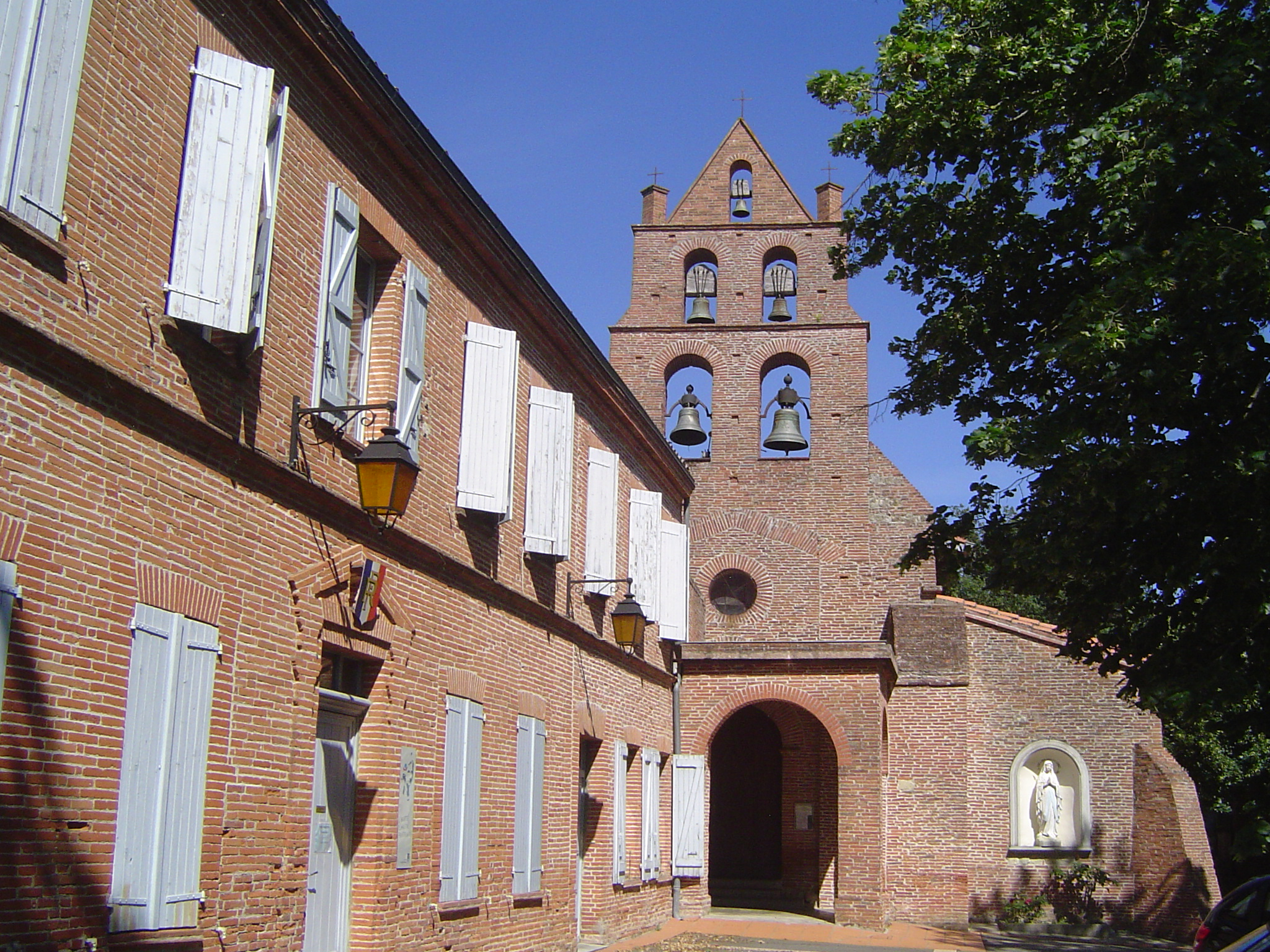 Vue de la mairie et de l'église d'Espanès.